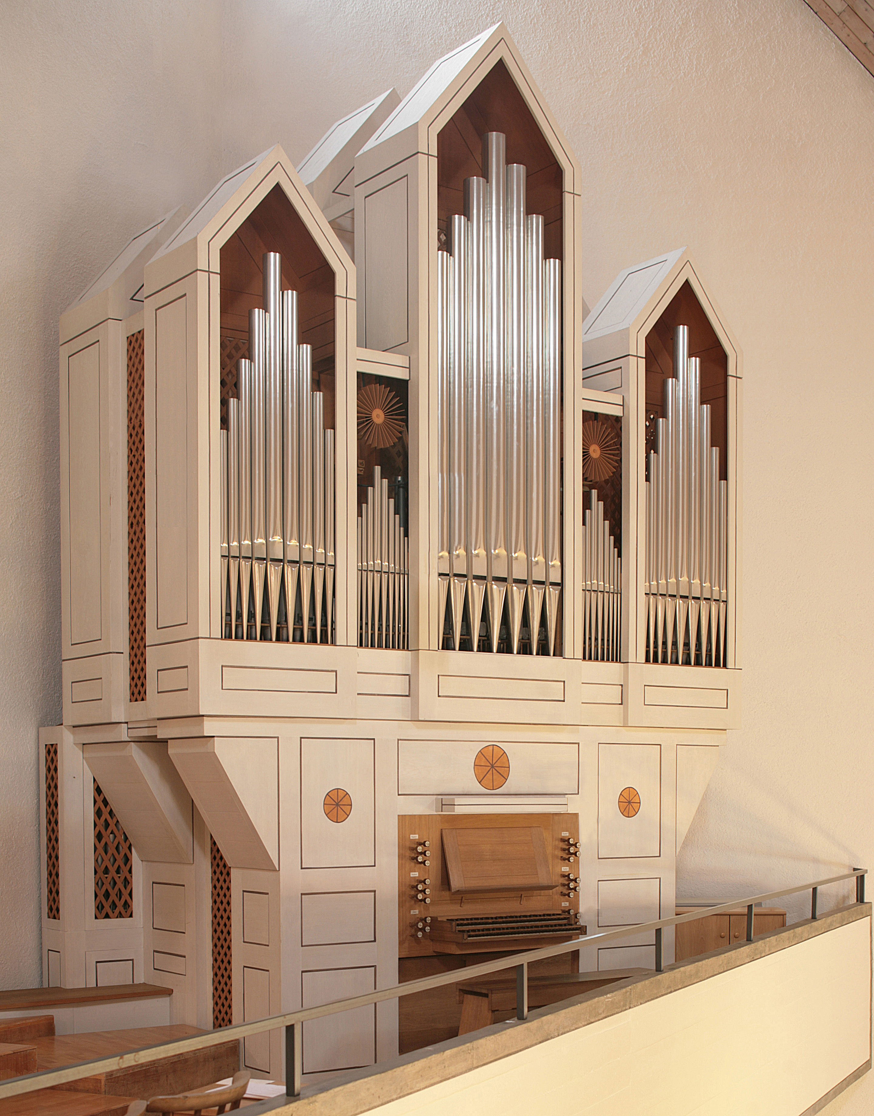 Orgel der Immanuelkirche München, Bayern, Deutschland